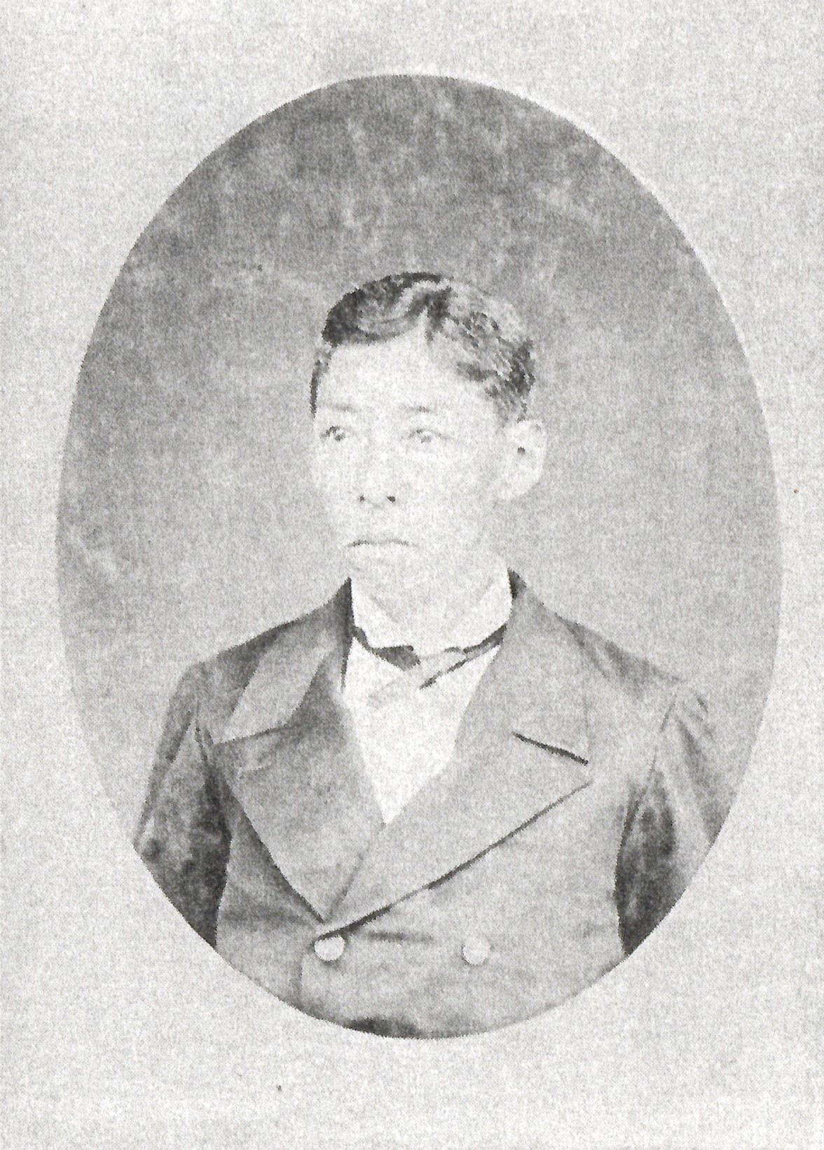 播磨山崎藩主本多忠明の肖像写真。